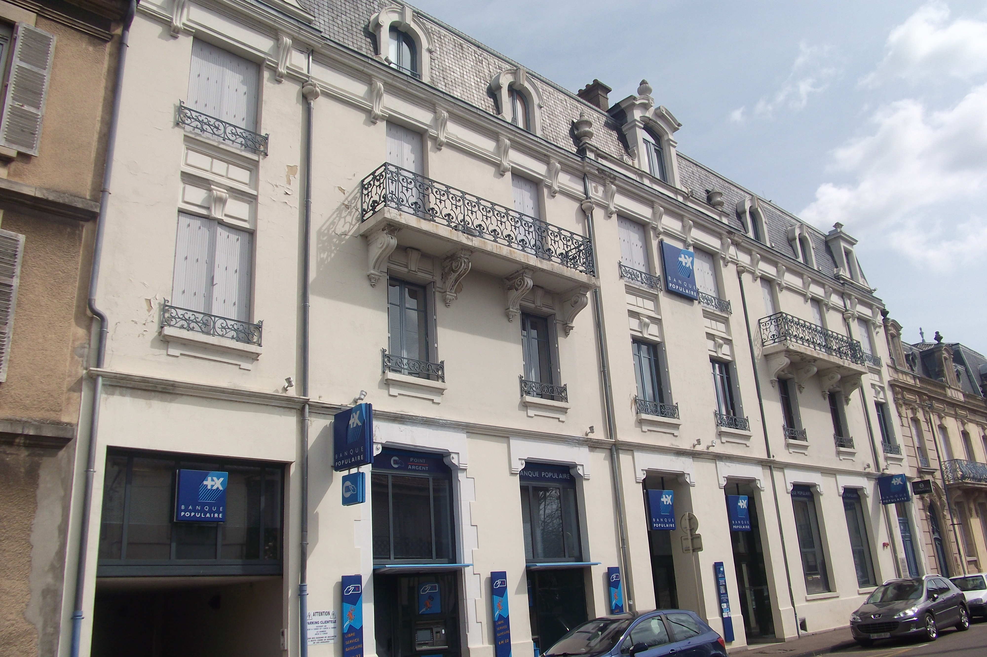 Anciennement l'hôtel des Postes de Vesoul. Le bâtiment de la Banque Populaire, situé rue Noirot